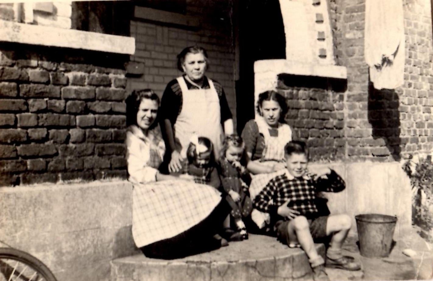 Illustration d'une famille de mineurs westphaliens. La photographie a été prise par Casimir Koterba, né le 24 février 1881 à Chytrowo-Jaroschino et mort le 23 octobre 1965 à Somain, mineur à la fosse De Sessevalle de la Compagnie des mines d'Aniche dans le bassin minier du Nord-Pas-de-Calais. On y voit son épouse Rosalie Jézierski, né le 19 août 1894 à Zarychowice et morte le 26 octobre 1976 à Somain, ses filles Jeanne (née le 7 août 1918 à Herne et morte le 11 janvier 1996 à Somain), Anna (1920-1977), Sophie (5 mai 1929-) et Héléna (1931-), ainsi que son fils Théodore, mon grand-père, né le 2 juillet 1924 à Haillicourt et mort le 17 février 1978 à Somain. La fille la plus âgée, Agnès, née le 18 décembre 1913 à Herne et morte le 21 août 2003 à Valenciennes n'est pas visible sur la photographie, car elle a dû prendre son indépendance. La famille avait eu un autre fils, Léo, né en 1922 et mort en 1923 après s'être ébouillanté. En se basant sur les différentes naissances, on voit que la famille est originaire de Pologne, a déménagée en Westphalie, puis s'est installée dans le Nord de la France en 1924 ou avant, pour travailler à la Compagnie des mines de Bruay, et s'est finalement installée à Somain, dans la cité Beaurepaire, entre 1924 et 1929, pour travailler à la fosse De Sessevalle. Je réside moi-même de cette cité, à seulement quelques dizaines de mètres de l'endroit où la photographie a été réalisé, nous n'y avons pas bougé depuis la fin des années 1920. Pour continuer la saga liée à l'exploitation minière, je suis historien spécialiste du bassin minier du Nord-pas-de-Calais et photographe, et je travaille à la fosse Arenberg, là où le mari de ma grand-tante Héléna a effectué ses dernières années en tant que mineur de fond.